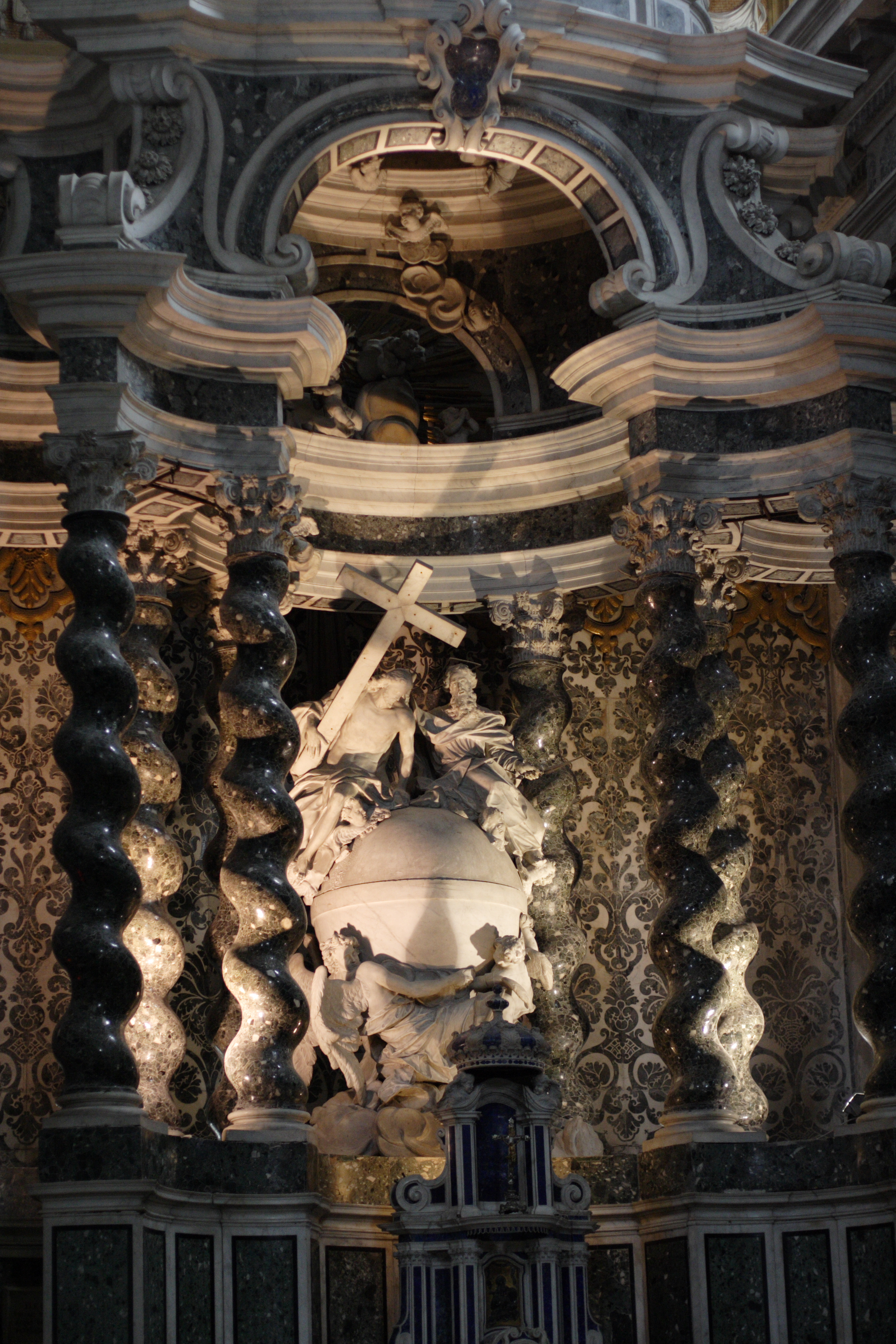 Chiesa di Santa Maria Assunta detta I Gesuiti. Altar